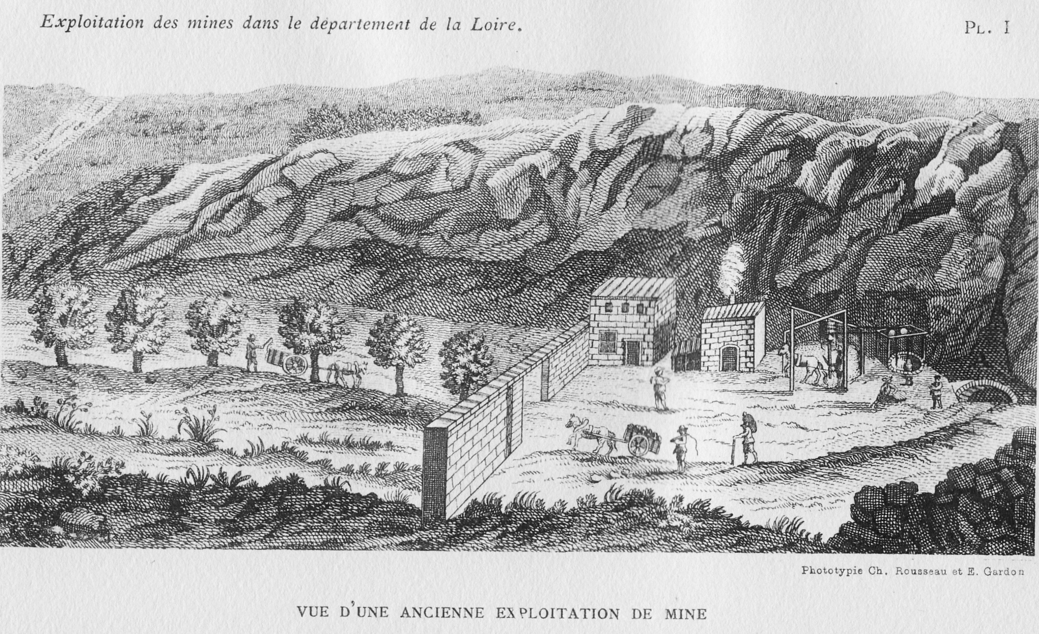 Représentation d'une exploitation de mine dans le département de la Loire au XVIIIème siècle.